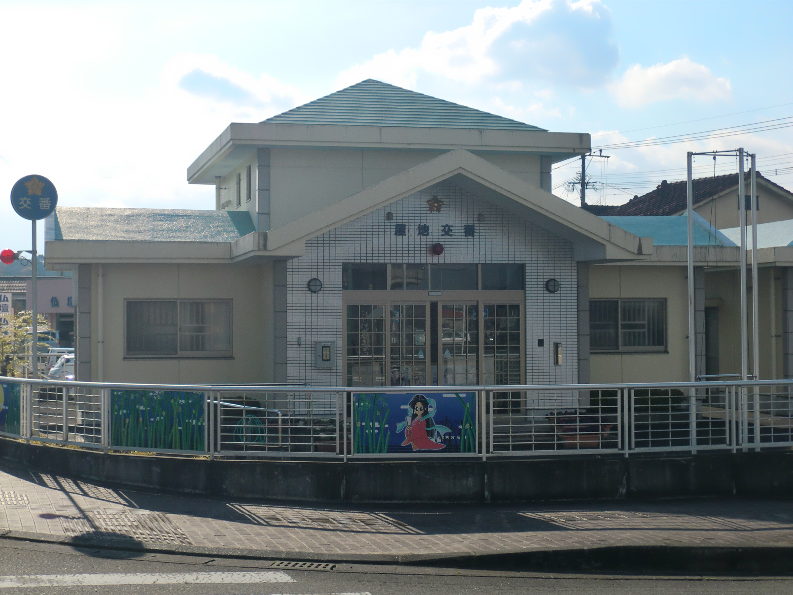 薩摩郡さつま町にあるさつま警察署屋地（やち）交番